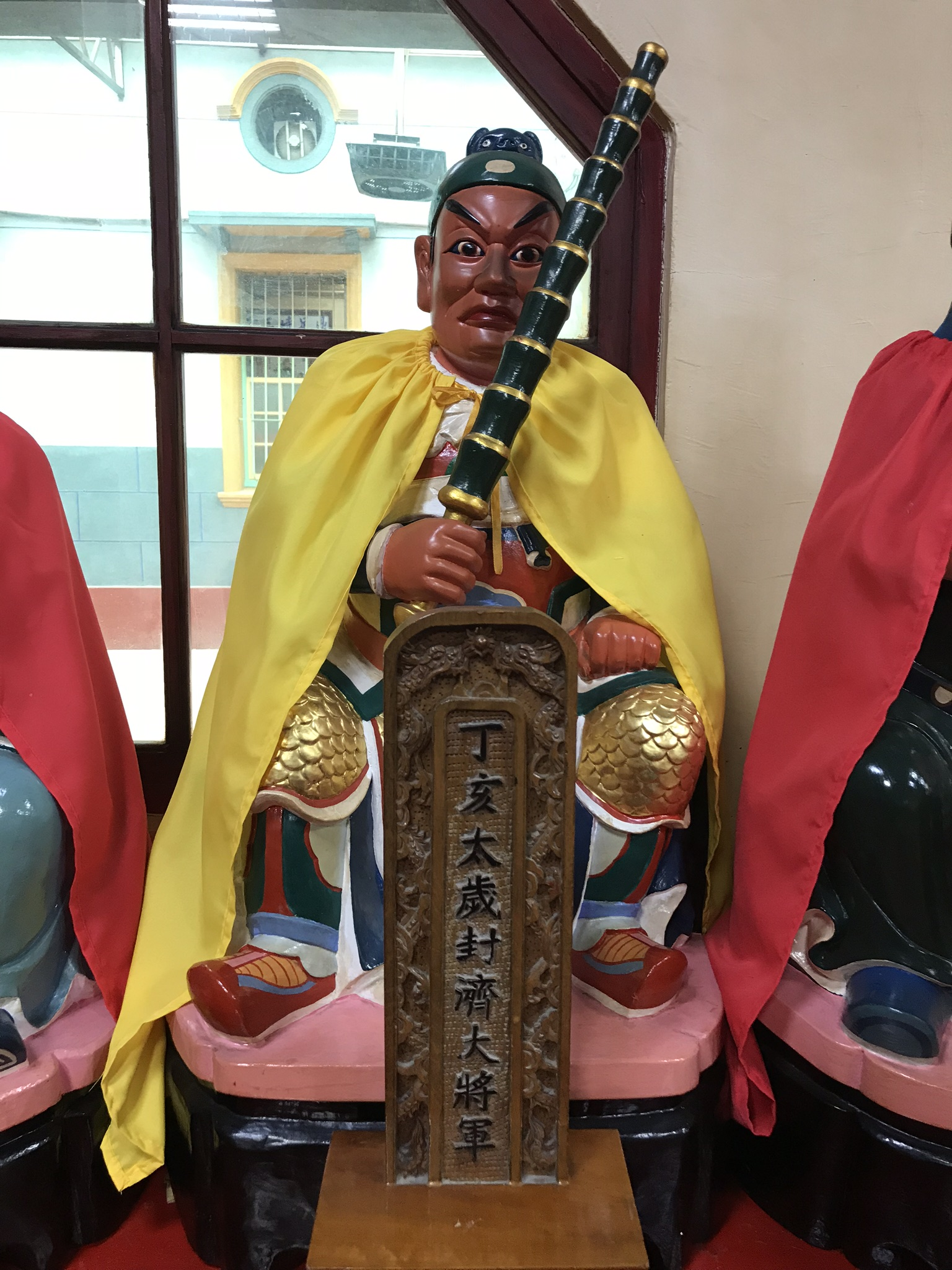 丁亥太歲封濟大將軍神像